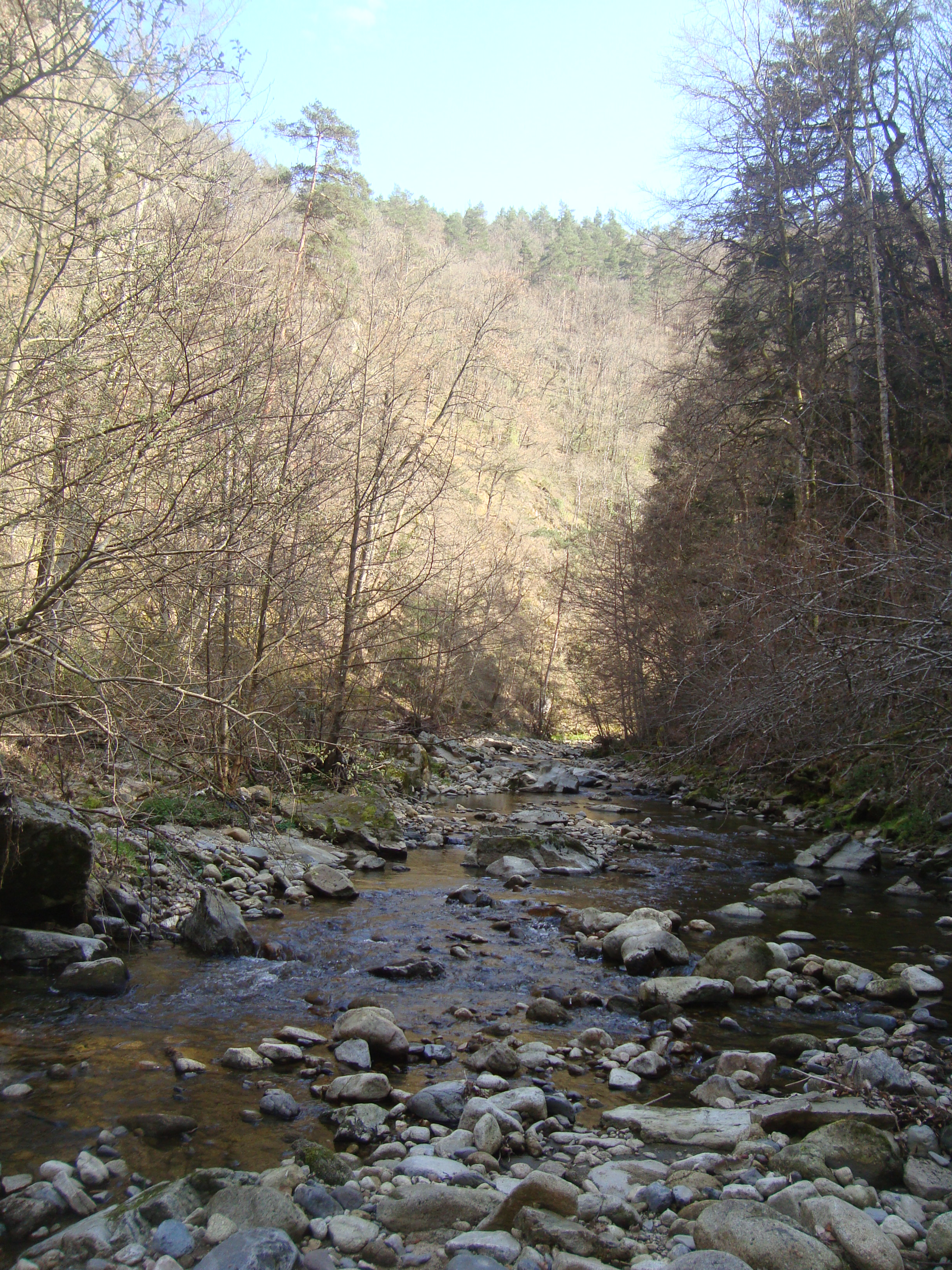 La rivière du Ramel à proximité du saut du chien (commune de Beaux, Haute-Loire, France)